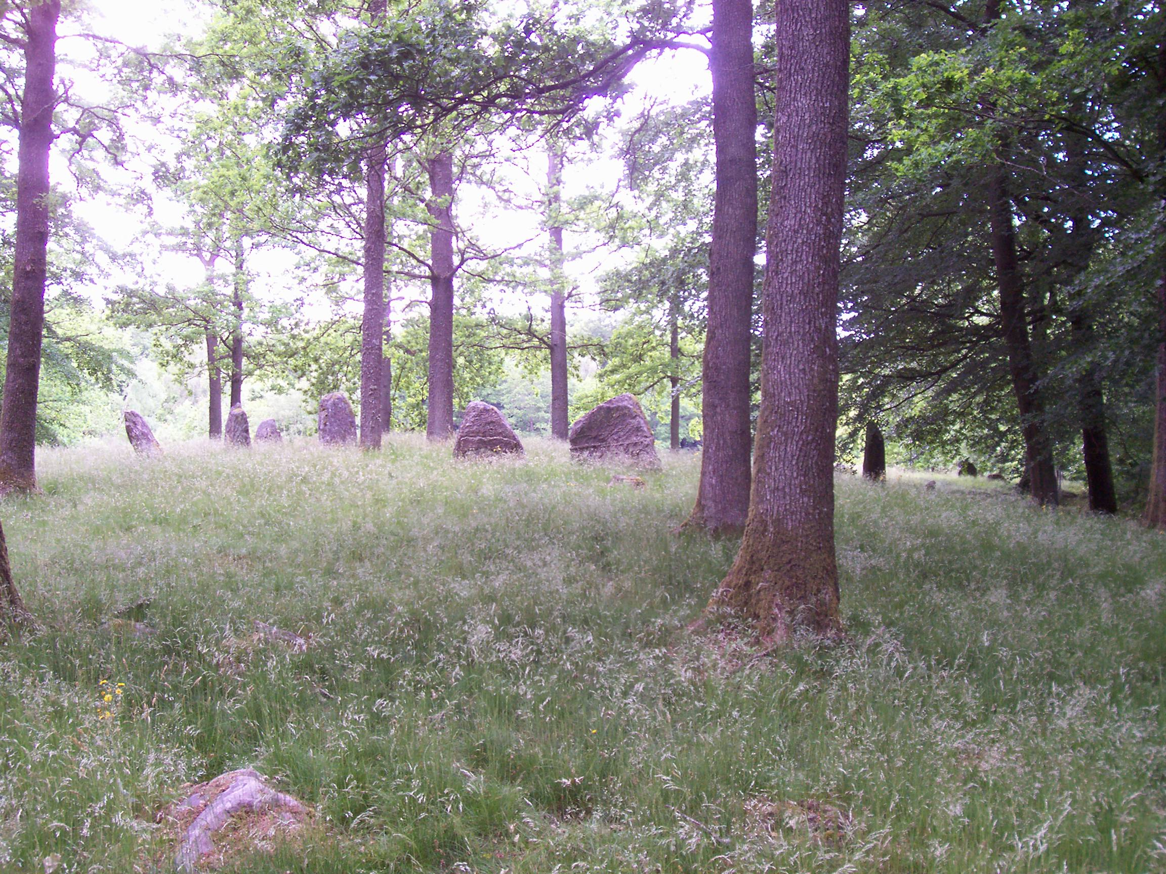 Häglinge 1:1